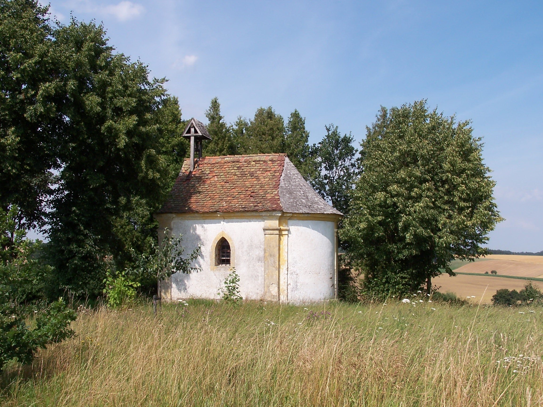 Oberlauterbach. Feldkapelle, sogenannte Pestkapelle. Barock, im 19. Jh. verändert; mit Ausstattung.